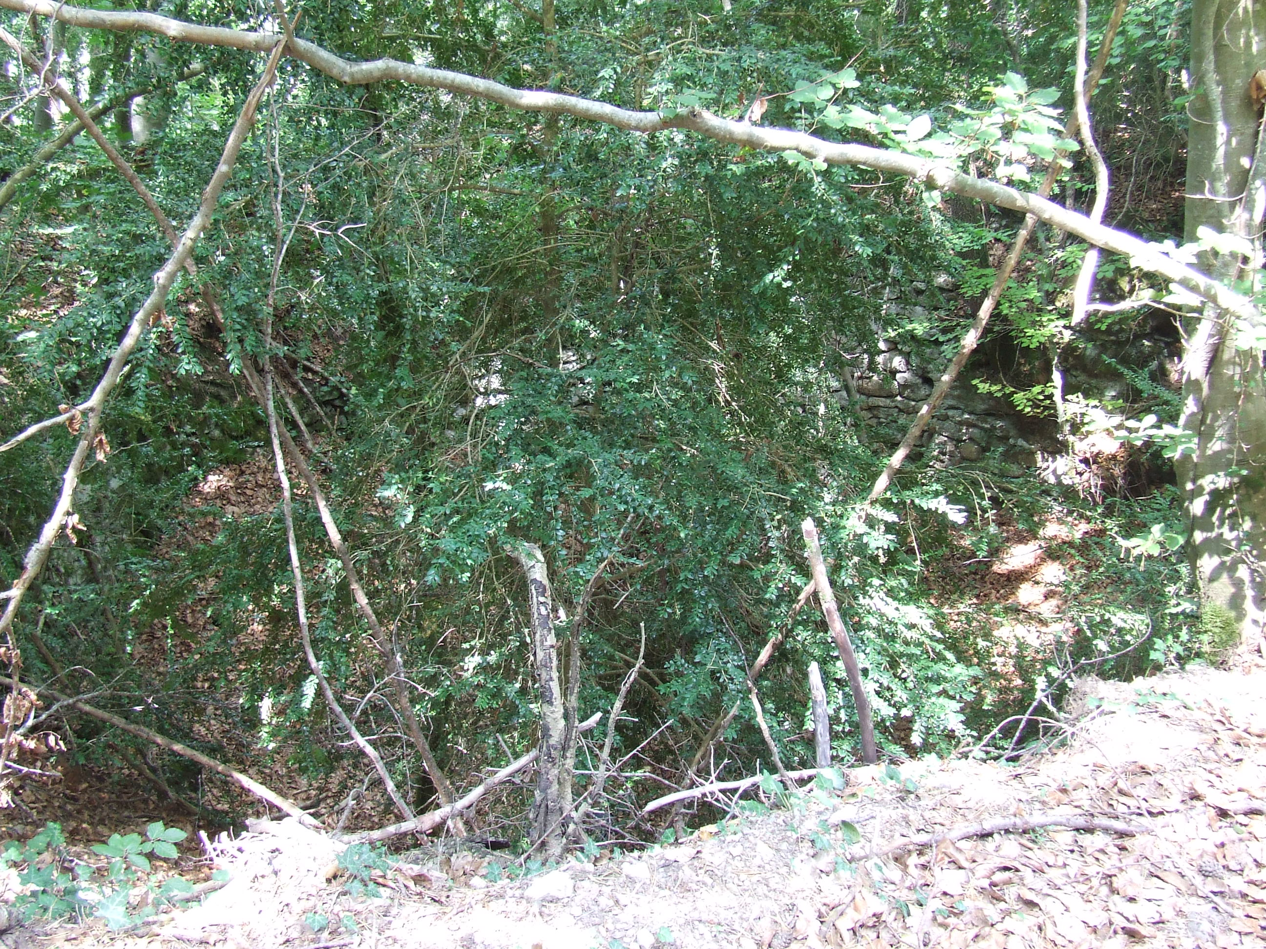 El Pou Cavaller (Castellcir, Moianès)